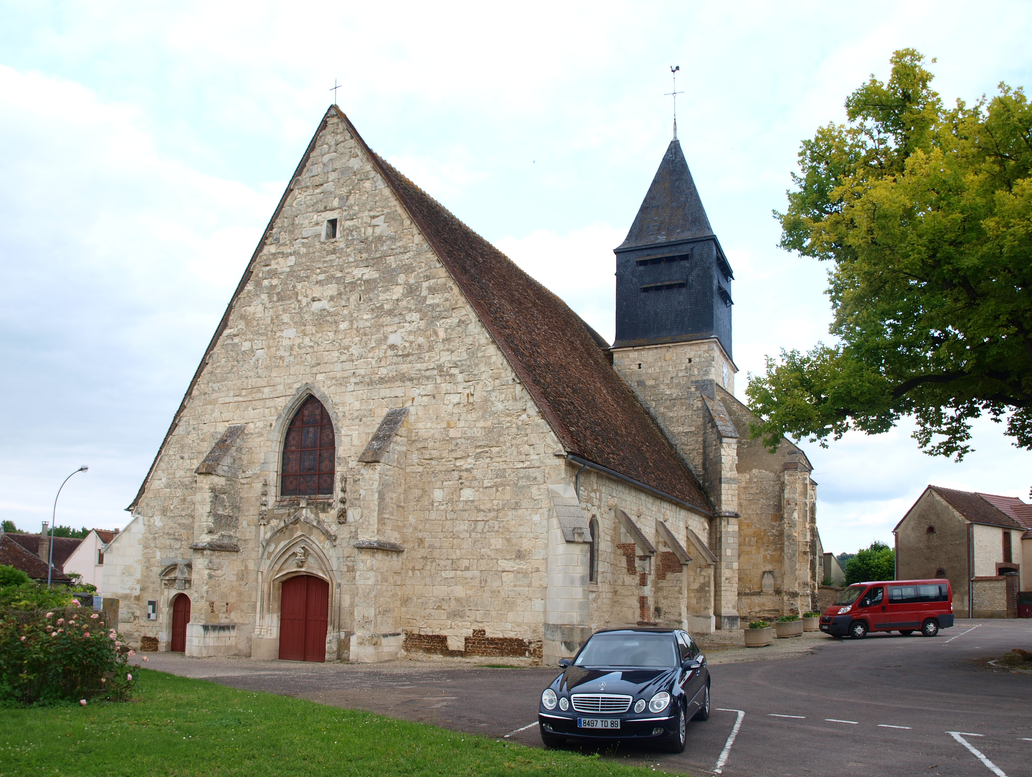 Fleury-la-Vallée (Yonne, France) , église